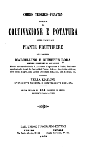 Frontespizio. Dal volume "Corso teorico-pratico sopra la coltivazione e potatura delle principali piante fruttifere" dei fratelli Marcellino e Pietro Giuseppe Roda, 3a ed., 1869.